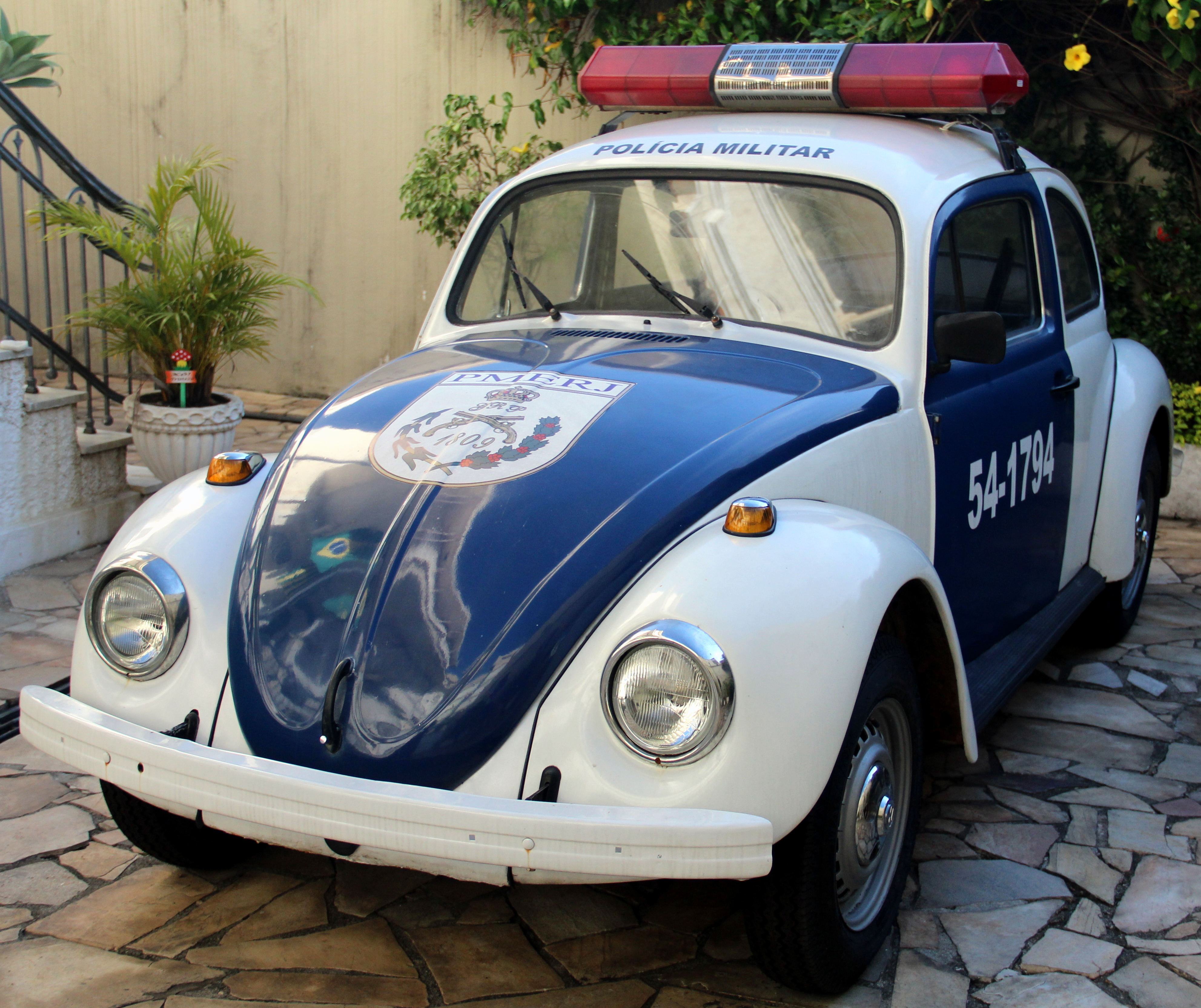 Polícia Militar do Estado do Rio de Janeiro